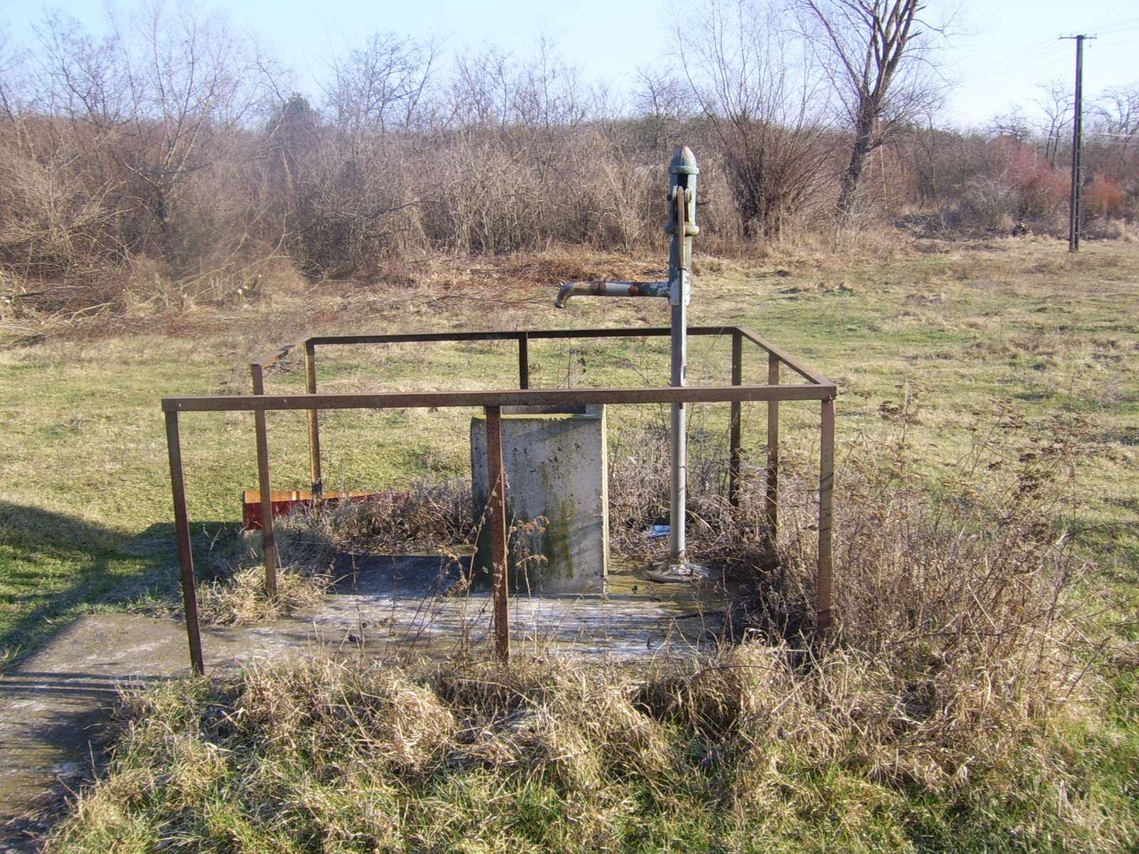 A Kismogyoróson található kút (Balkány)